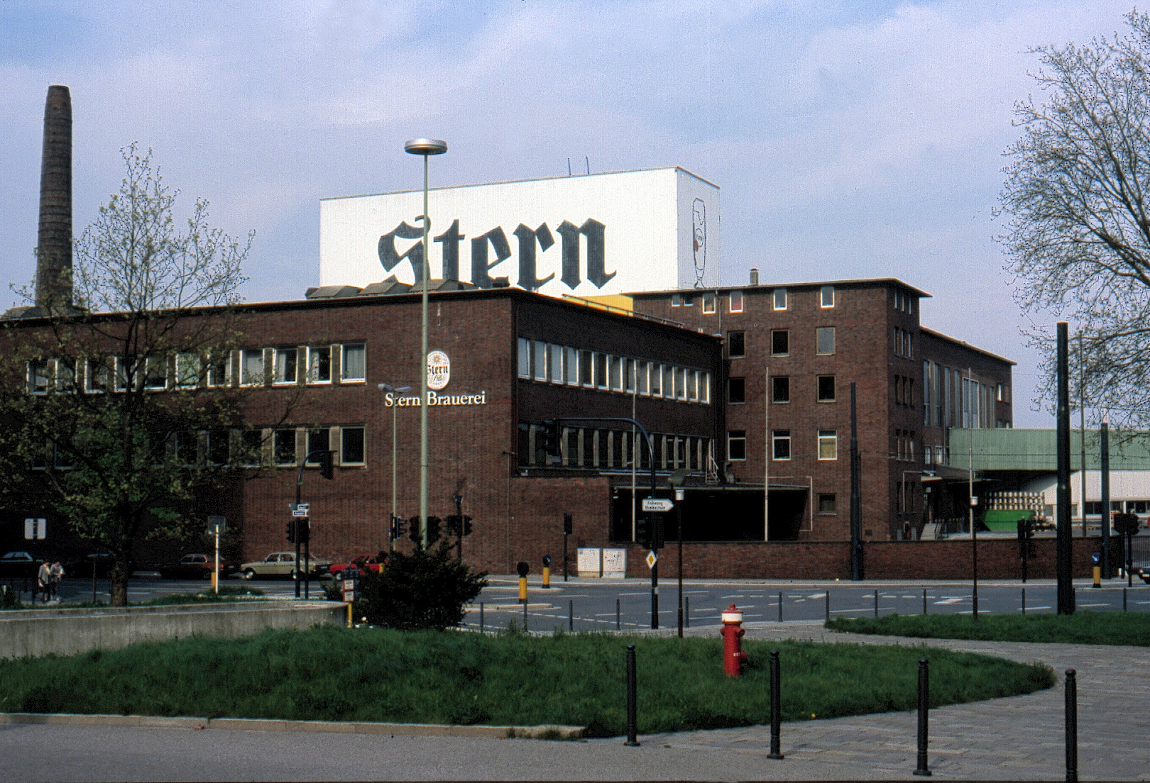 Die Stern-Brauerei vom Aalto-Theater aus gesehen. An dieser Stelle steht heute der RWE-Turm.